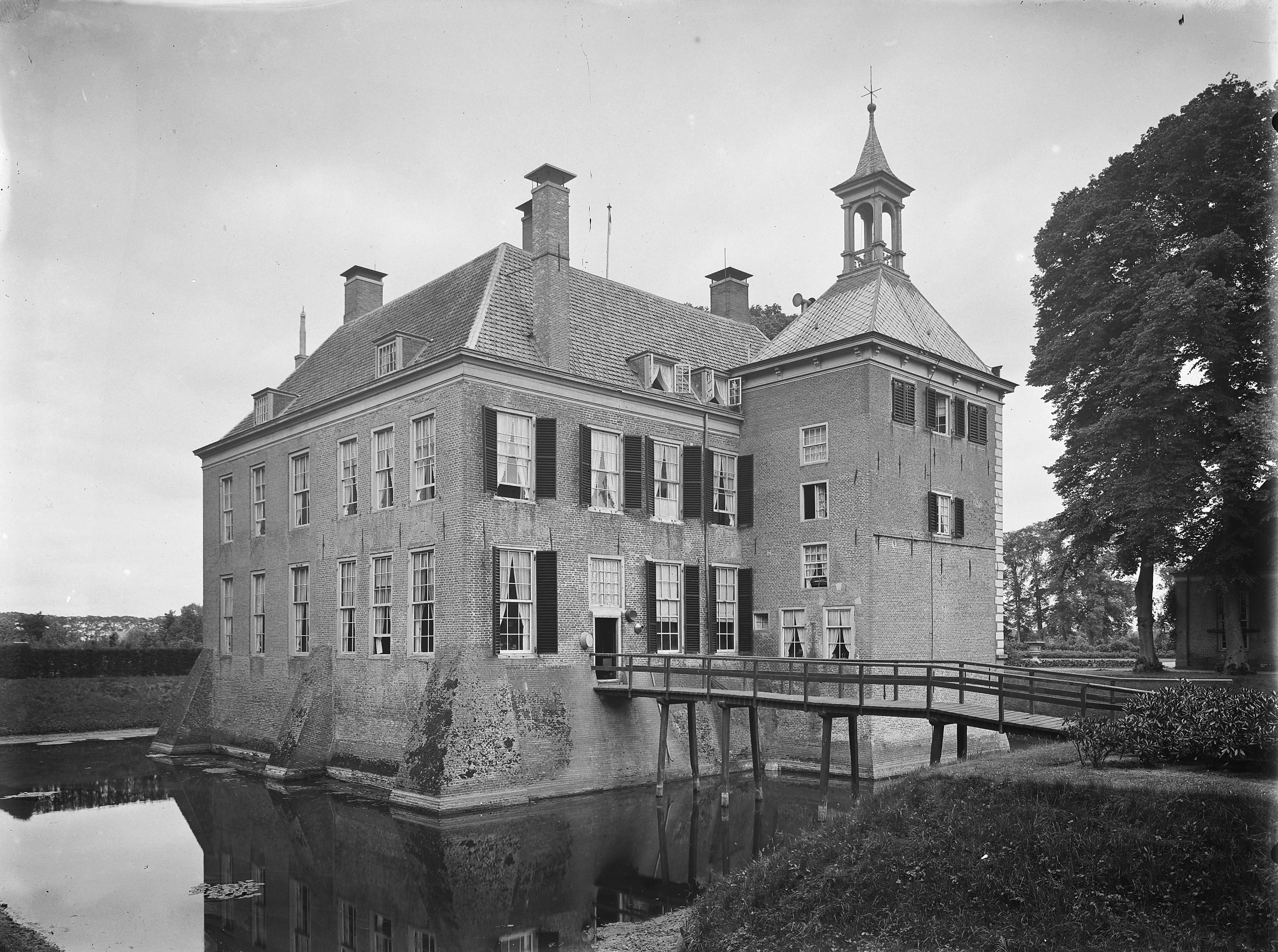 Huis Windesheim: Zijgevel met toegangsbrug, achtergevel en gracht (opmerking: In: Buiten ; 16 (1922), nr. 1, p. 5)